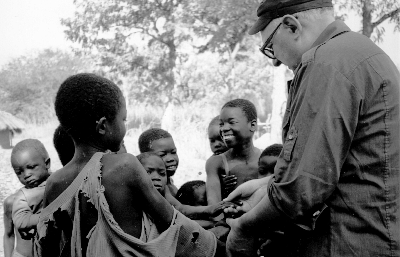 En voyage en République Centrafricaine, le père Joseph salue les enfants dans un village proche de la frontière du Tchad